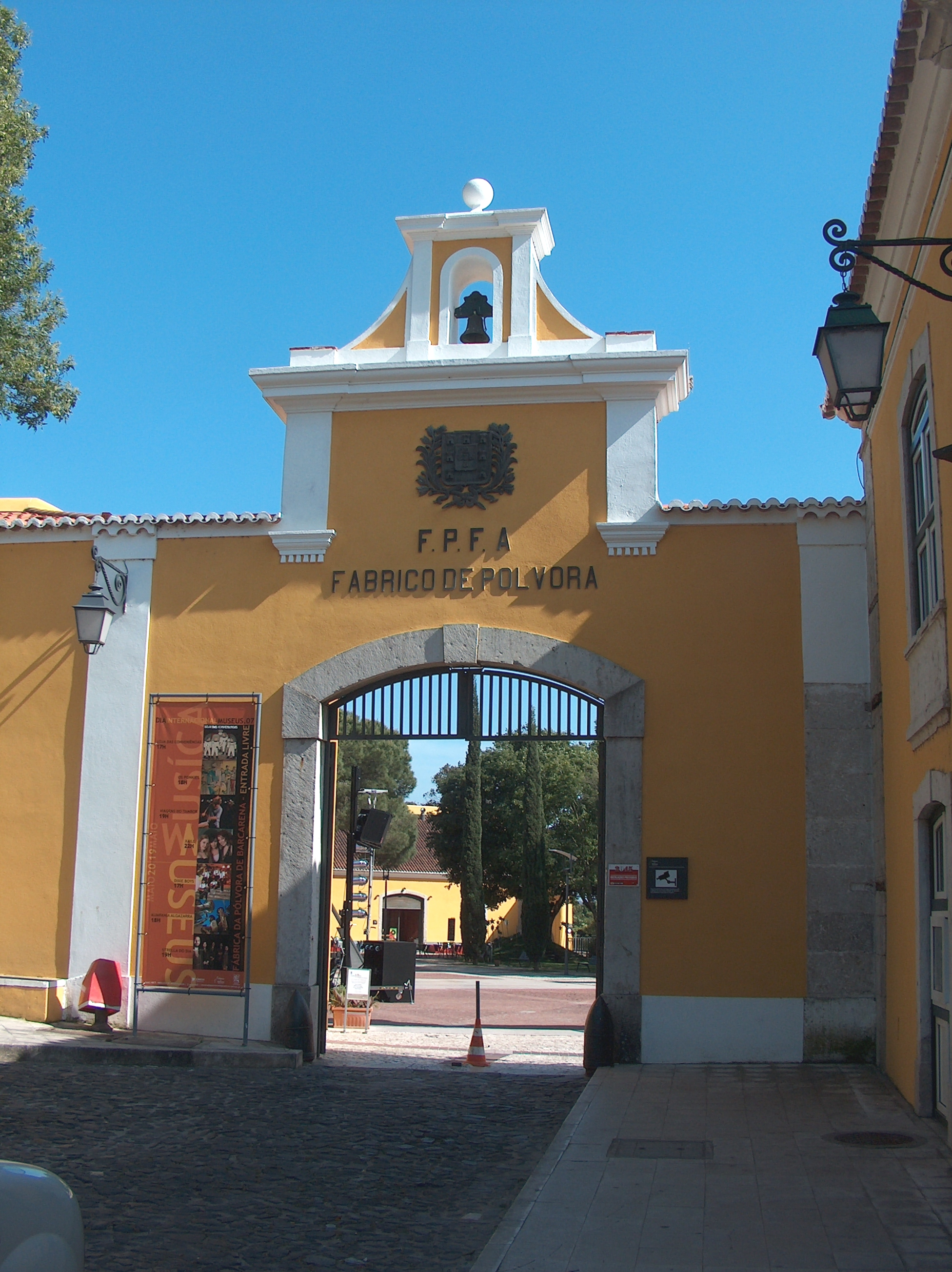 Fábrica da Pólvora de Barcarena. Freguesia de Barcarena, no Concelho de Oeiras, no Distrito de Lisboa, Portugal.